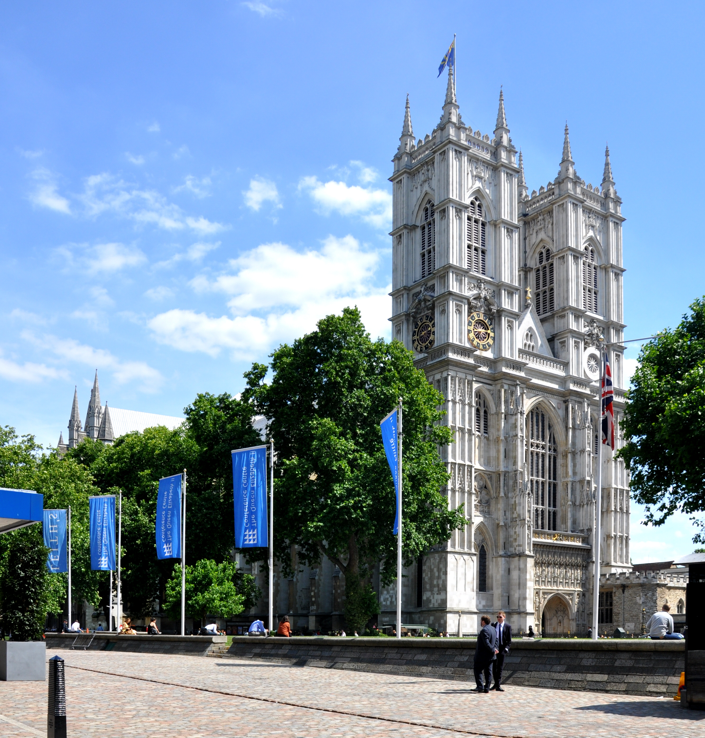 London, Westminster Abbey